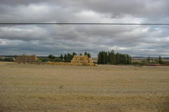 campo santo tome de zabarcos